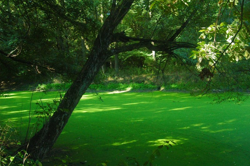 Morava river, abandoned meander in Slovakia